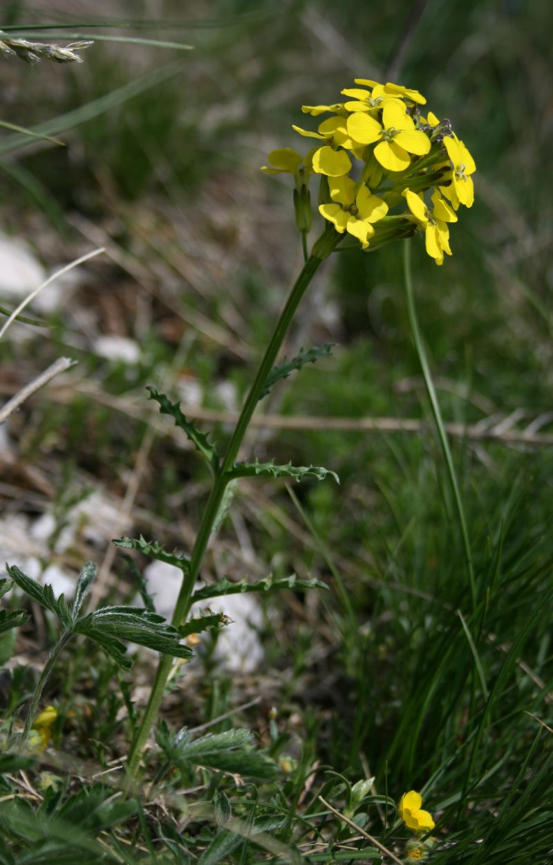 Erysimum carniolicum, Kreuzblütler (Brassicaceae) - Kroatien/Hrvatska/Croatia: Istra, Park Prirode Učka, Vojak